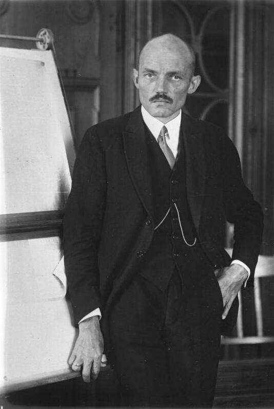 Dr. Dornier, der geniale Construkteur und Schöpfer des größten deutschen Flugbootes Do X, wird dasselbe bei seiner Fahrt nach Amerika begleiten